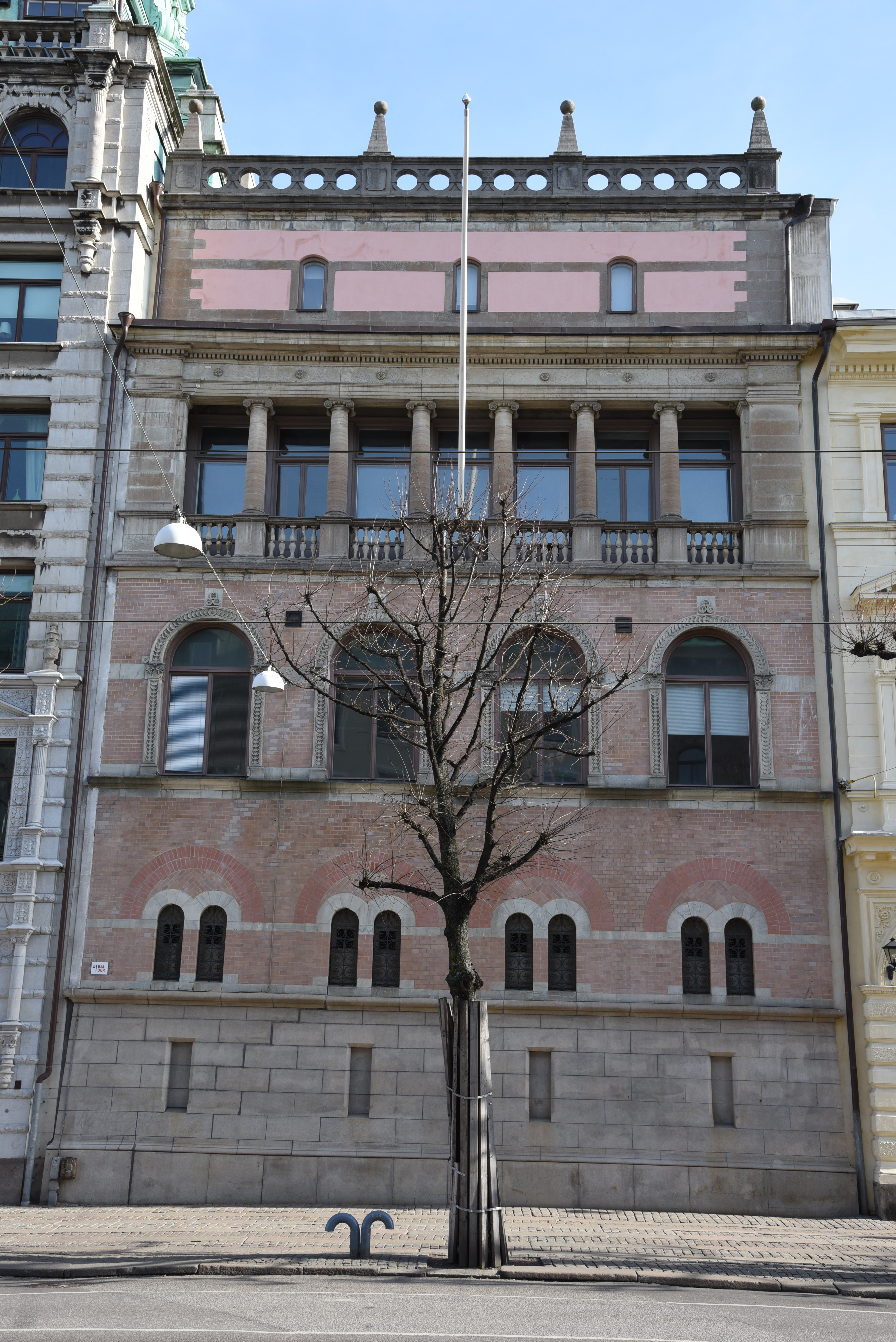 Västra Hamngatan 4 i kvarteret Kommerserådet i stadsdelen Inom Vallgraven i Göteborg. Byggnaden uppfördes år 1895 för Svenska Kreditaktiebolaget efter ritningar av Hjalmar Kumlien och byggdes på år 1920 efter ritningar av Ernst Krüger.